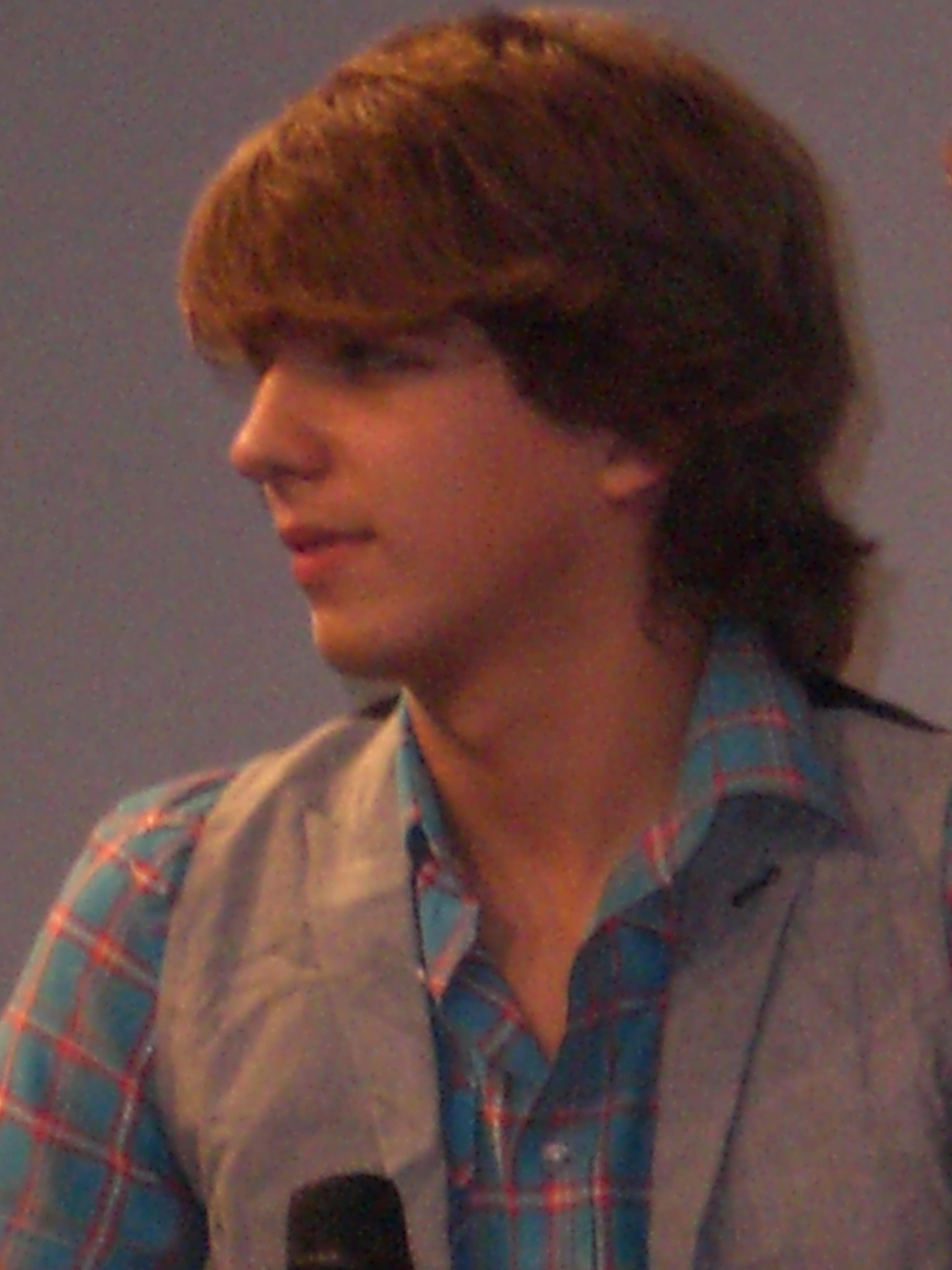 Salone del libro, Torino, presentazione del libro di Miley Cyrus,"Hannah Montana"